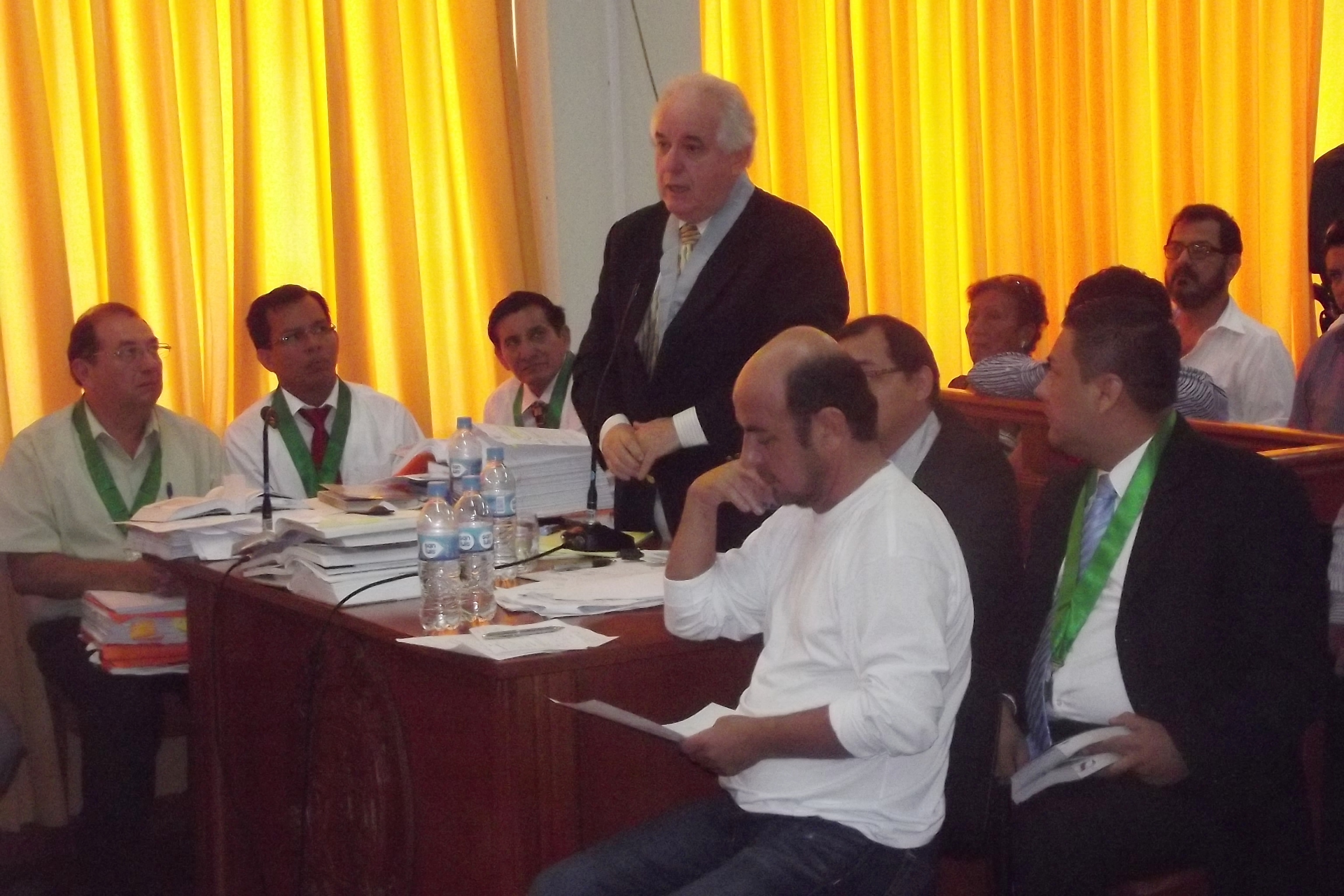 Iván Vásquez en audiencia